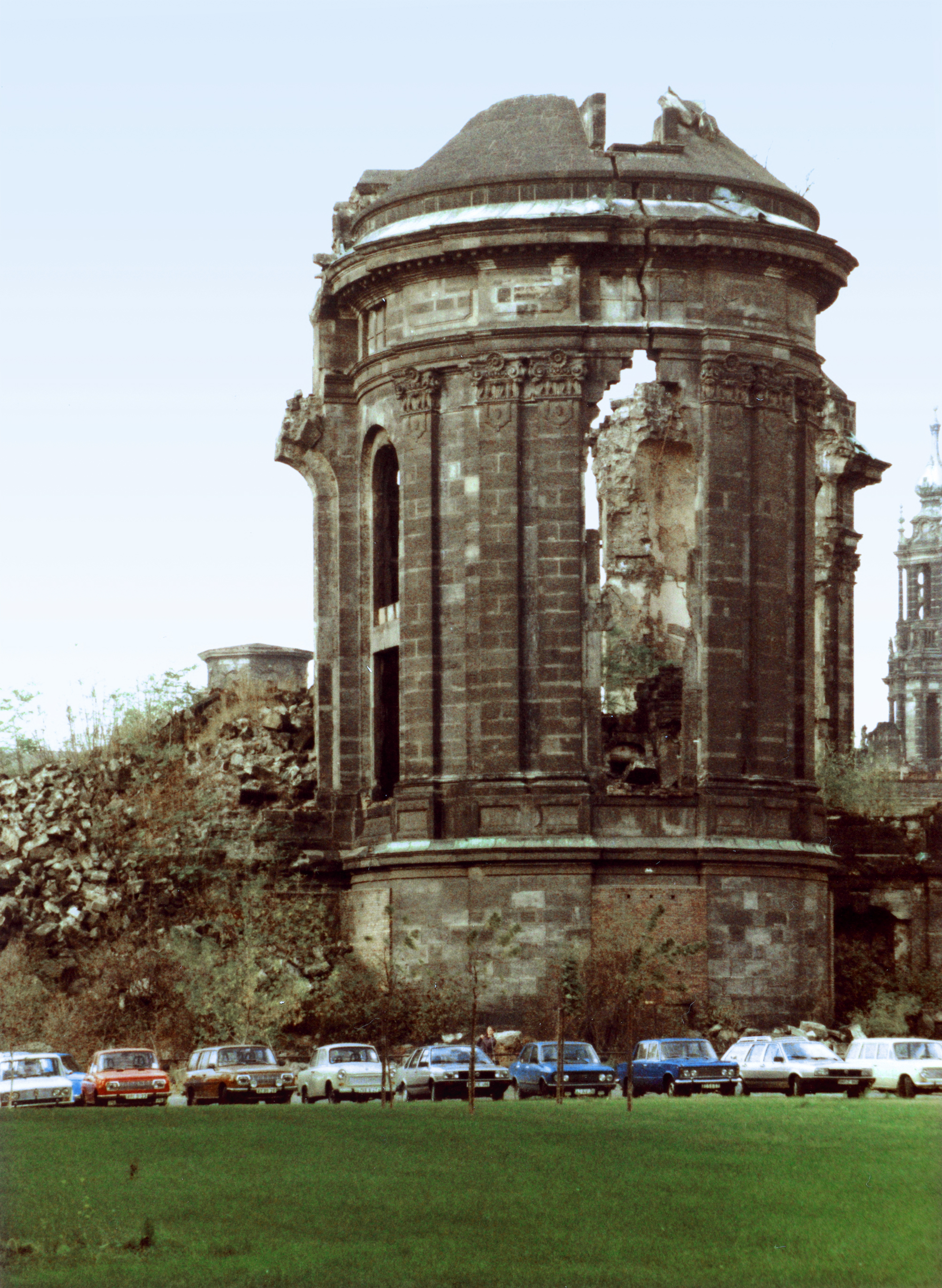 Ruine der Dresdner Frauenkirche Oktober 1985 (im Hintergrund die Hofkirche)